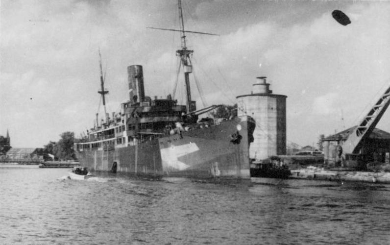 ADN-ZB/Illus-SNB Wilhelmshaven. - Kriegsschiff als Gemeinschaftsheim der deutschen Seeleute, Mitglieder der Marine-Dienst-Gruppen